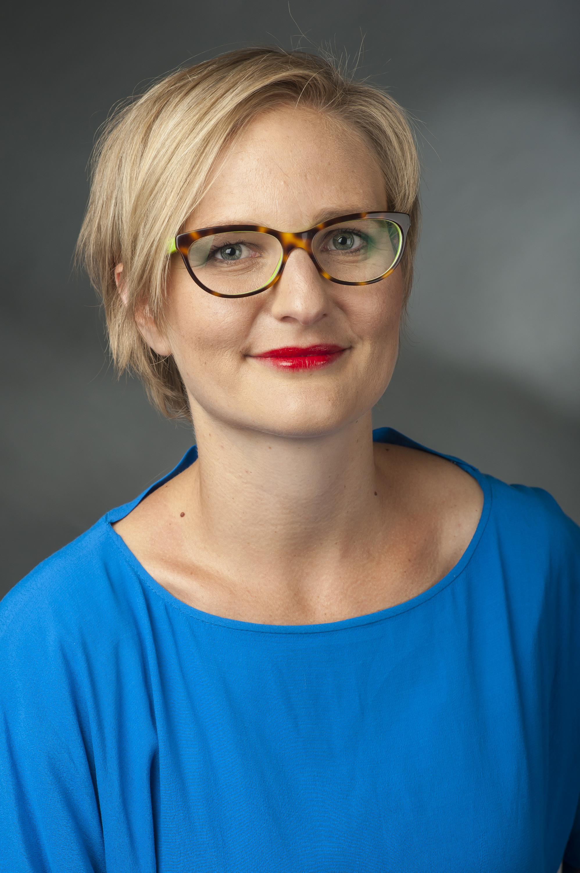 Franziska Brantner (* 24. August 1979 in Lörrach) ist eine deutsche Politikwissenschaftlerin und Politikerin (Bündnis 90/Die Grünen). Sie gehört dem 18. Deutschen Bundestag an.